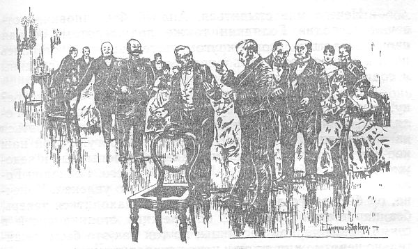 Иллюстрация Елены Самокиш-Судковской к повести Фёдора достоевского «Двойник». 1895 год.